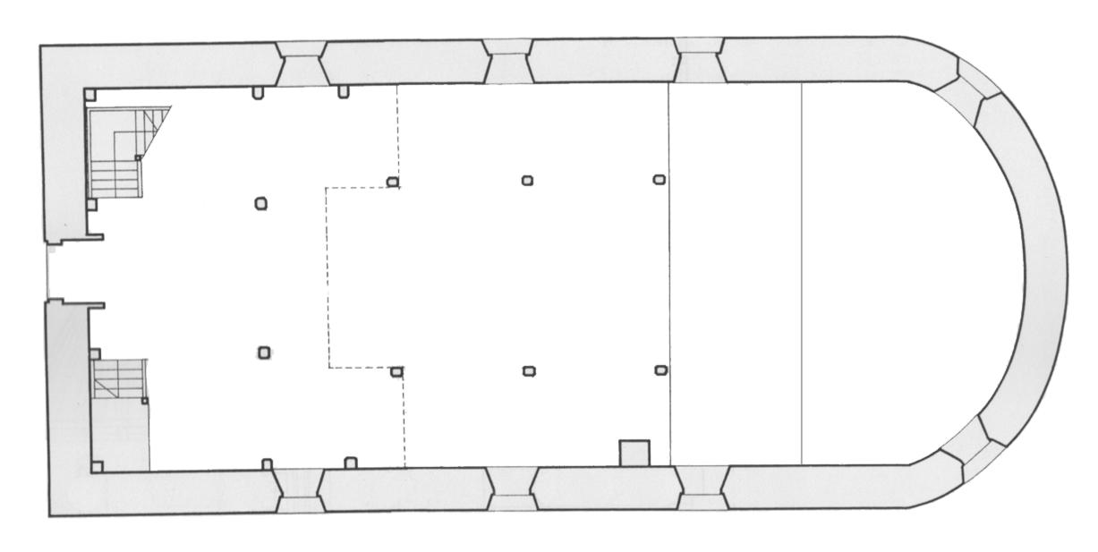 Kościół w Wojcieszycach. Rzut przyziemia (stan współczesny)